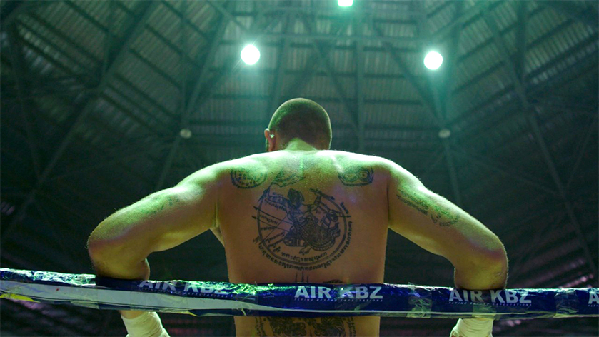 Photos issues du tournage du La Fosse aux Tigres